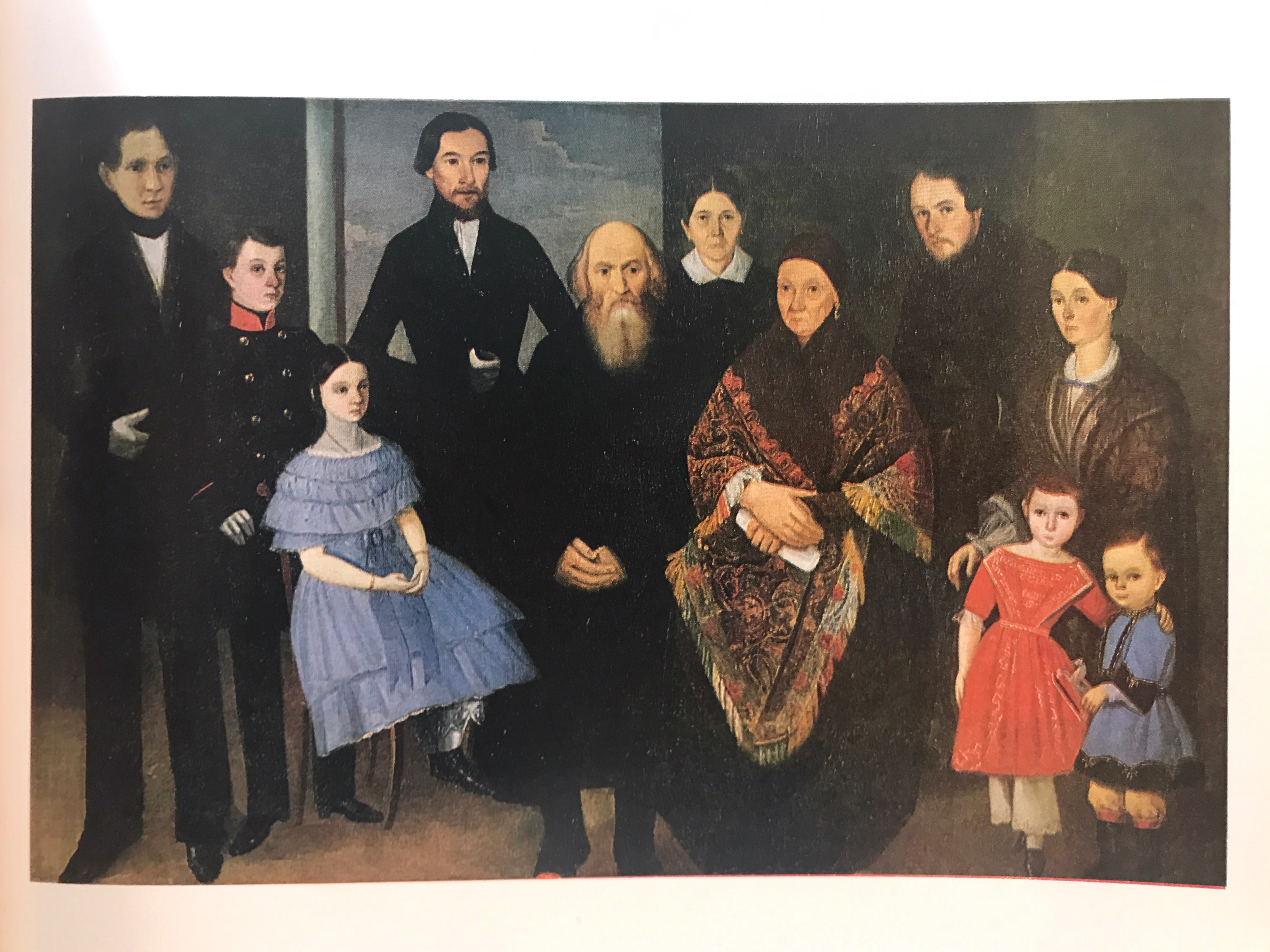 Портрет купеческой семьи. Неизвестный художник, перв.половина XIXв.